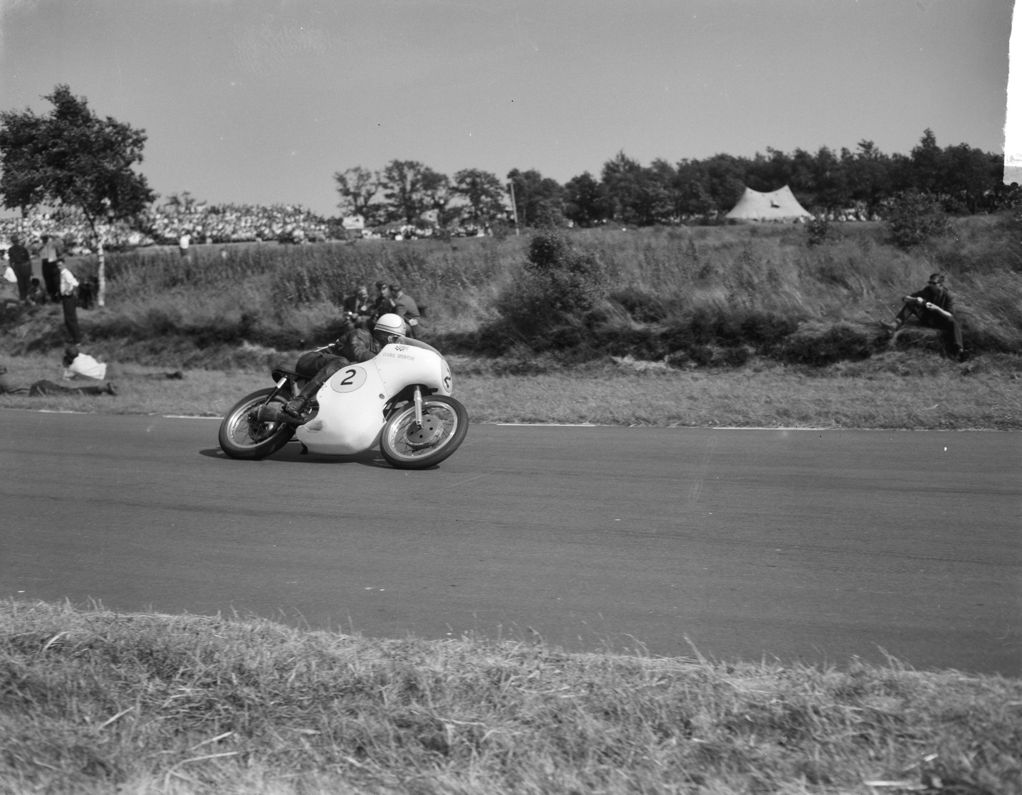 Collectie / Archief : Fotocollectie Anefo Reportage / Serie : TT Assen 1961 Beschrijving : Mike Hailwood (Engeland) op Norton Datum : 24 juni 1961 Locatie : Assen Trefwoorden : RACES, motorsport Persoonsnaam : Hailwood, Mike Fotograaf : Bilsen, Joop van / Anefo Auteursrechthebbende : Nationaal Archief Materiaalsoort : Negatief (zwart/wit) Nummer archiefinventaris : bekijk toegang 2.24.01.04 Bestanddeelnummer : 912-6400